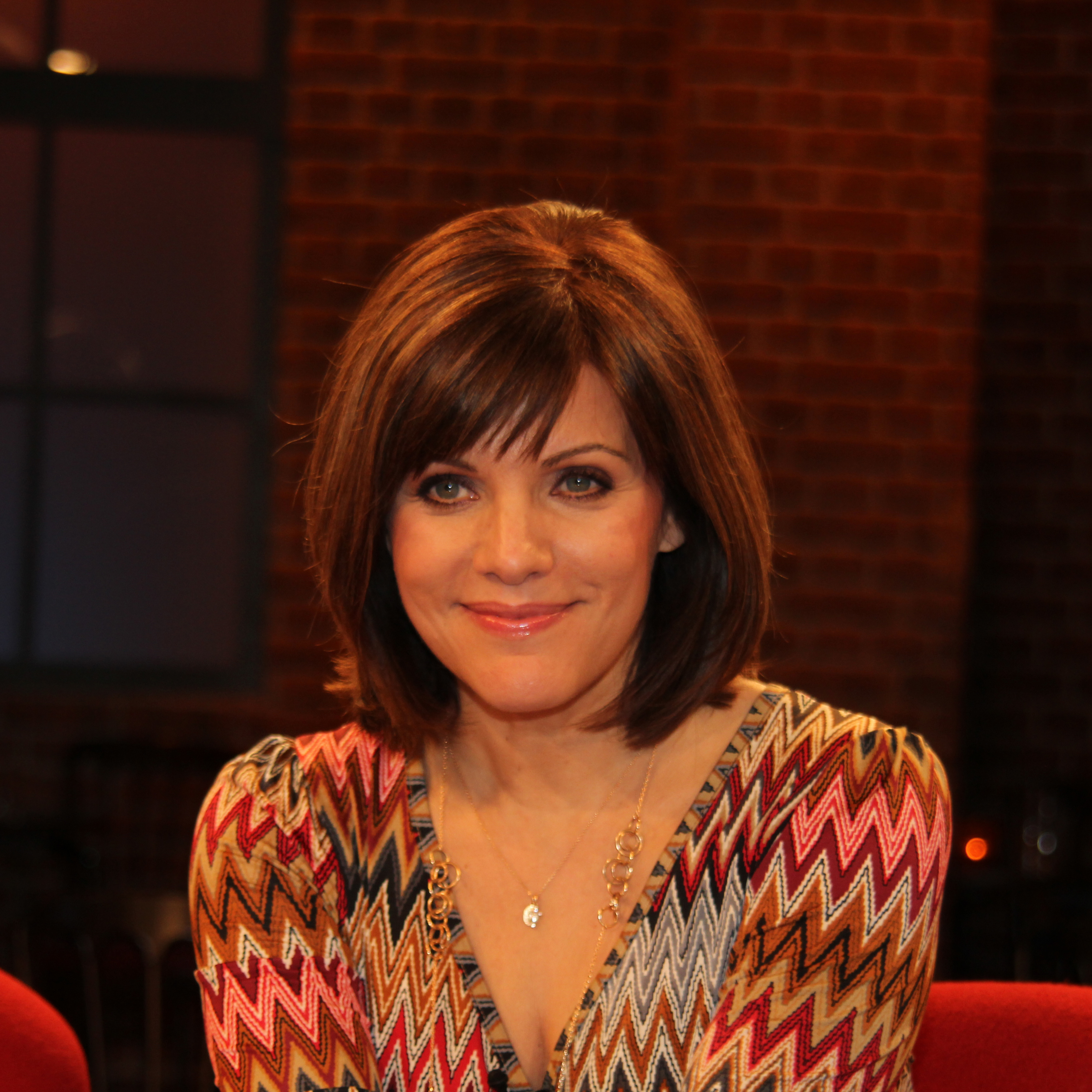 Foto nach der Aufzeichnung des Kölner Treffs, eine Fernsehsendung des Westdeutschen Rundfunks